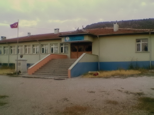 Balikesir Gokkoy Ilkogretim Okulu, Balikesir, Turkey.